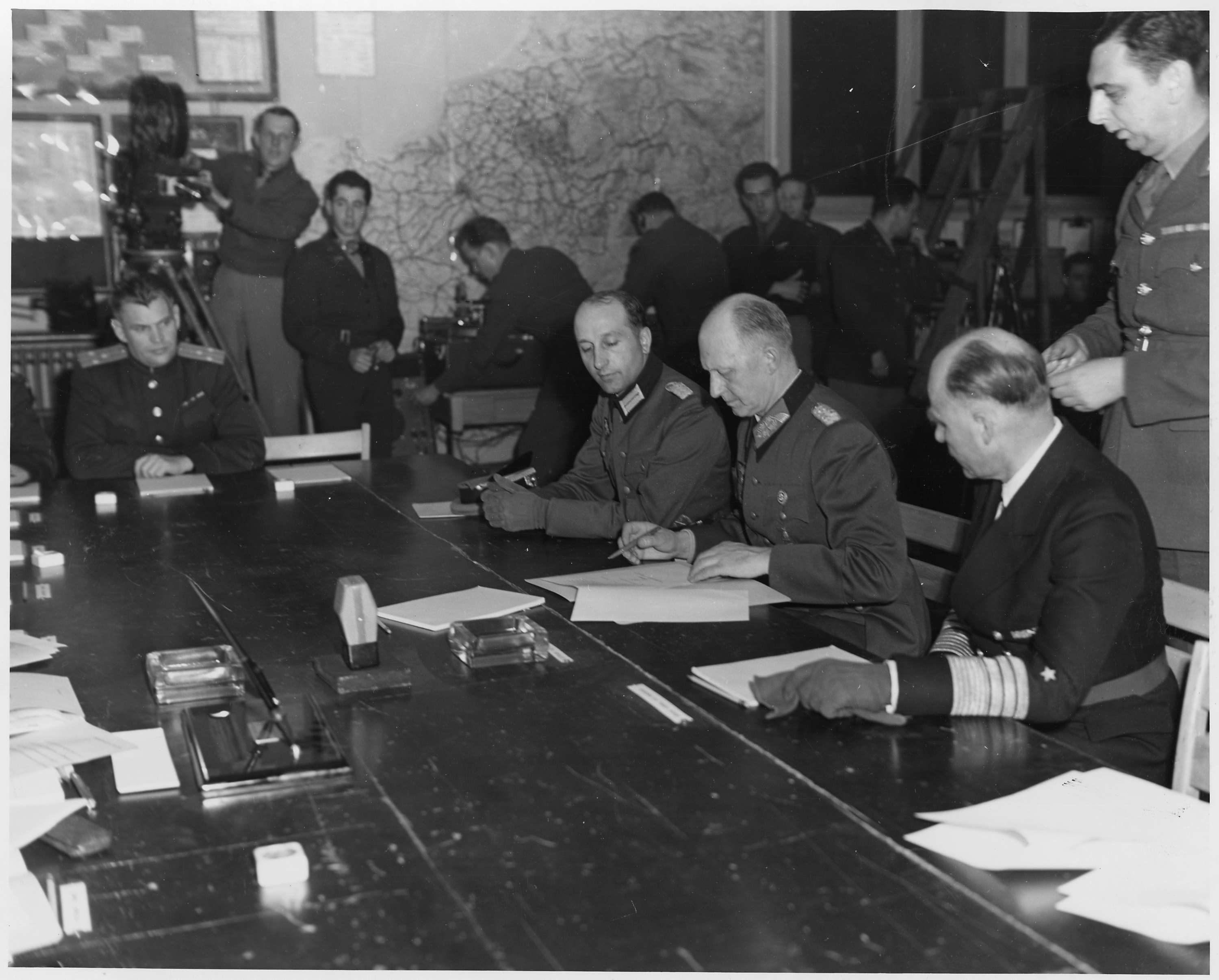 Подписание первого акта о капитуляции в Германии генерал-полковником А. Йодлем. В торце стола сидит военный разведчик полковник Иван Иосифович Зенькович.